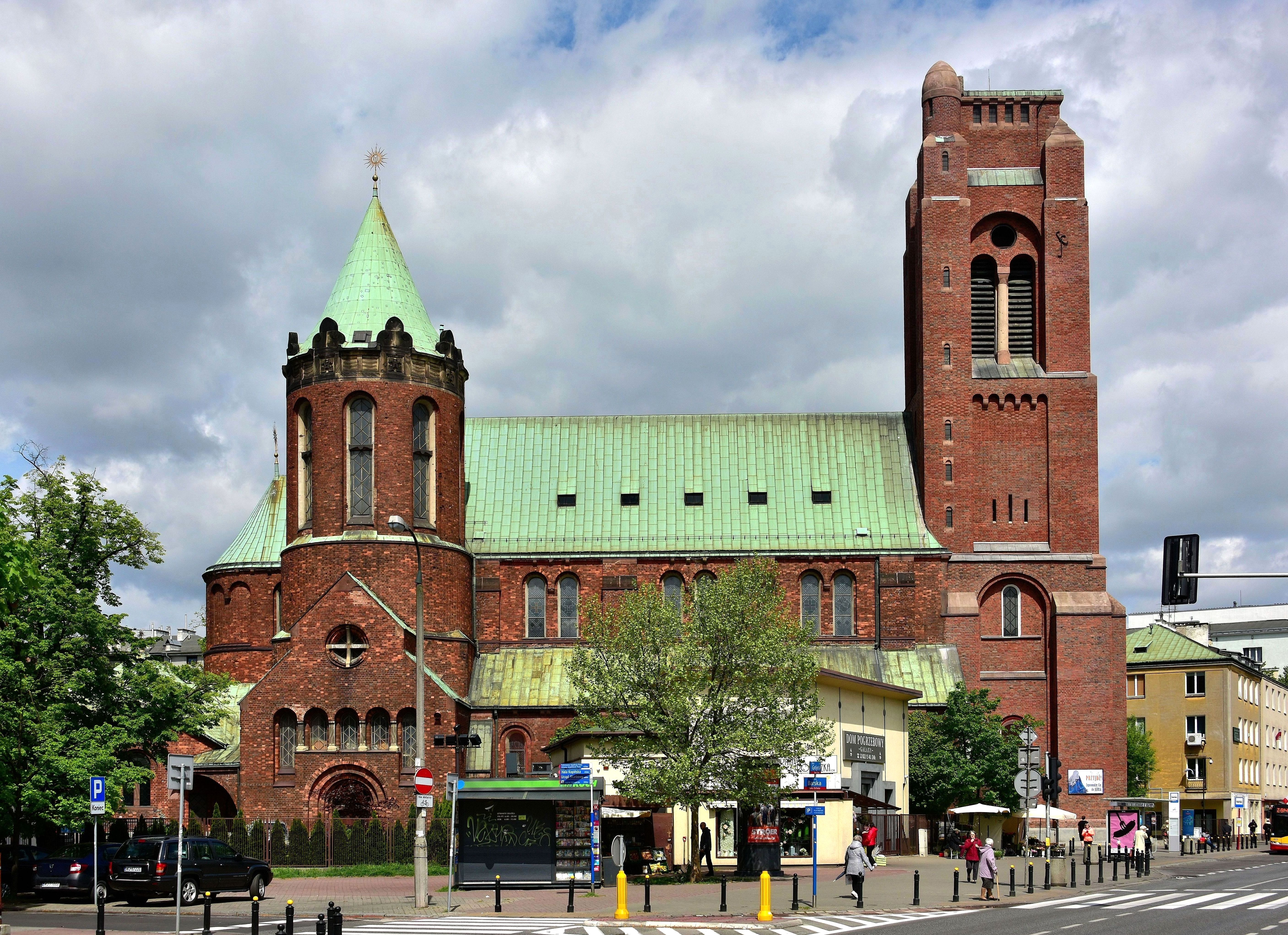 Kościół Niepokalanego Poczęcia Najświętszej Maryi Panny przy placu Narutowicza w Warszawie